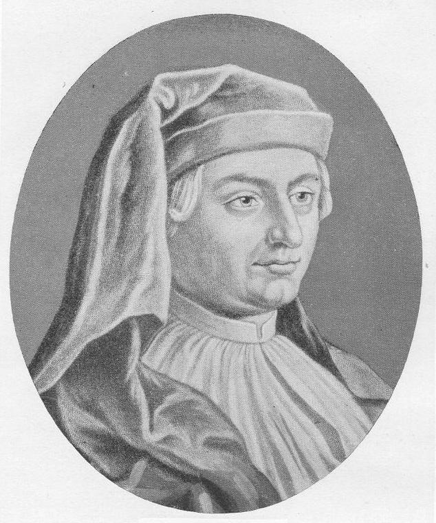 Rudolf Agricola (1444–1485), niederländischer Humanist. Stich von Johann Jacob Haid (1704–1767).